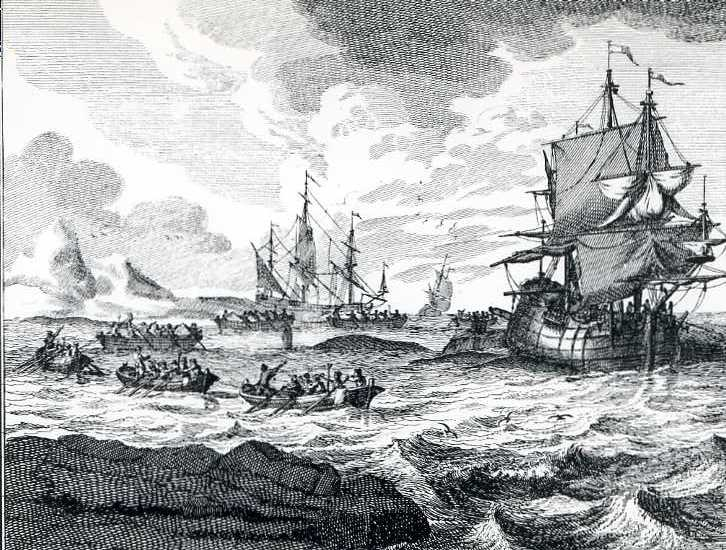 Kupferstich: Adolf van der Laan (ca. 1690 - 1742)